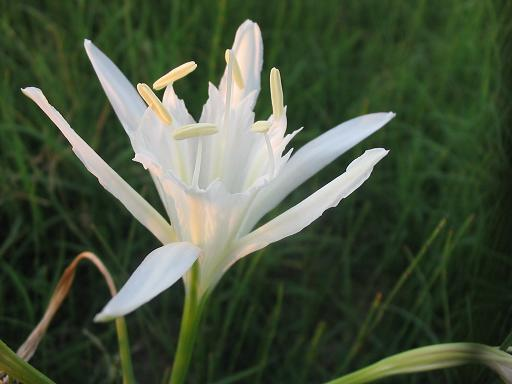 Pancratium_maritimum Blüte Pancratium maritmum, Exemplar 40cm Höhe, Aufnahme im August, Ebro-Delta